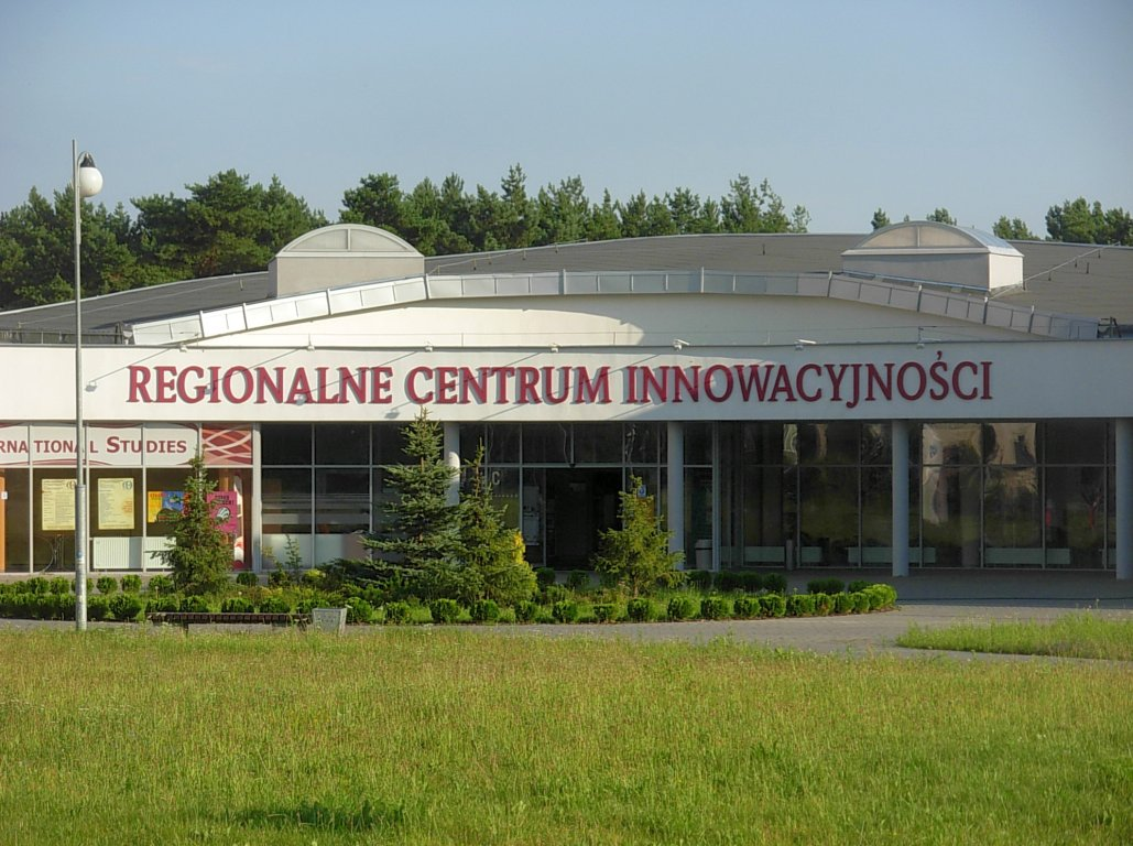 Regionalne Centrum Innowacyjności Uniwersytetu Technologiczno-Przyrodniczego w Bydgoszczy